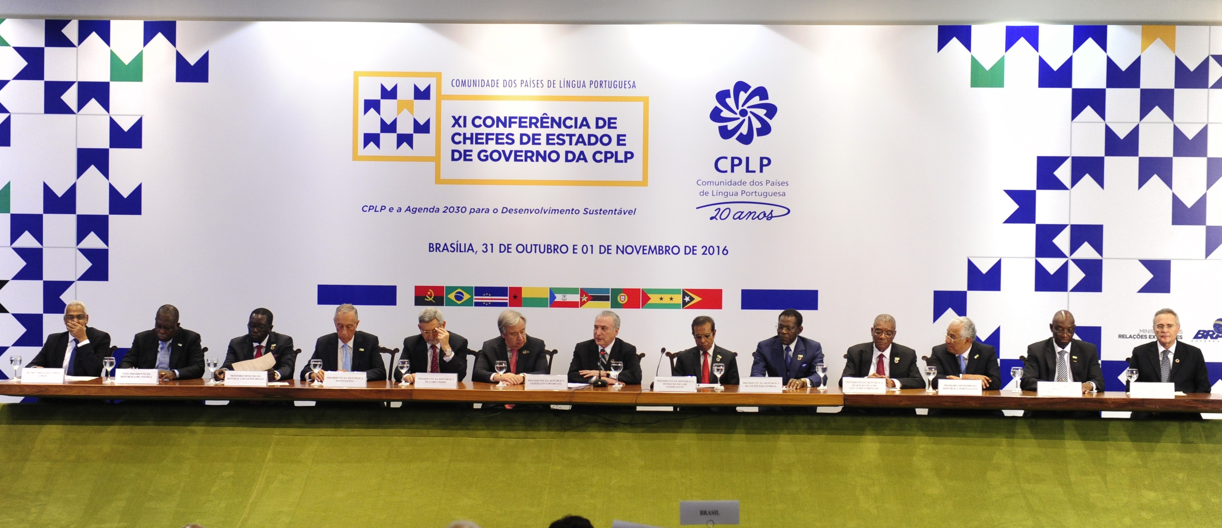 Presidente da RepÃºblica Michel Temer e o presidente do Senado Federal, senador Renan Calheiros (PMDB-AL) participam da XI ReuniÃ£o de chefes de Estado e de Governo da ComissÃ£o de PaÃ-ses da Comunidade da LÃ-ngua Portuguesa (CPLP), no PalÃ¡cio Itamaraty. Foto: Jonas Pereira/AgÃªncia Senado